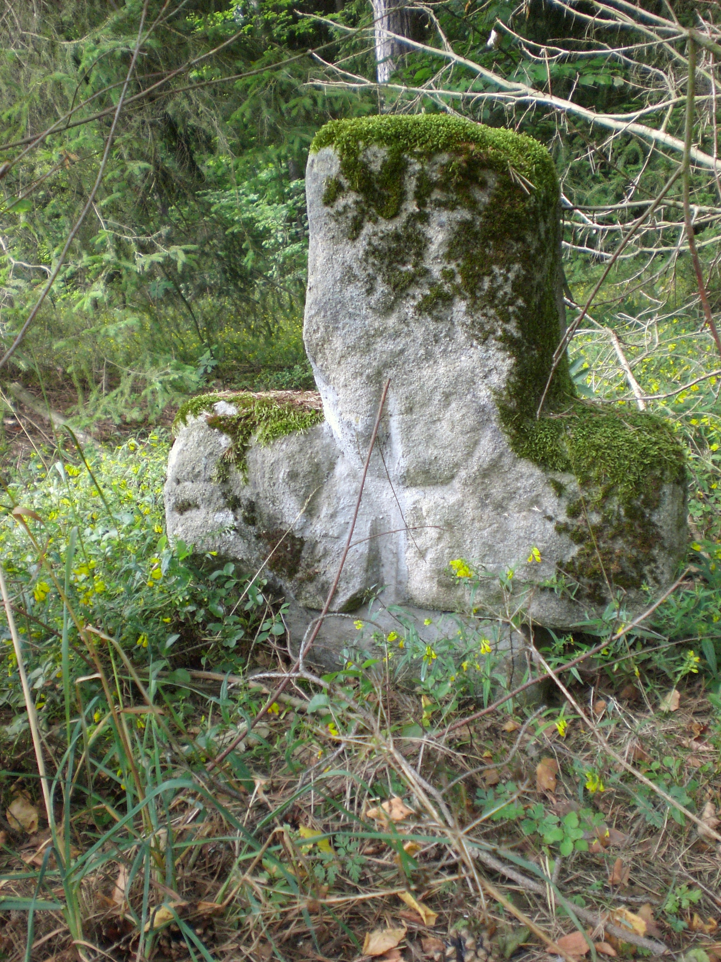 Steinkreuz zwischen Schwarzenbruck und Feucht